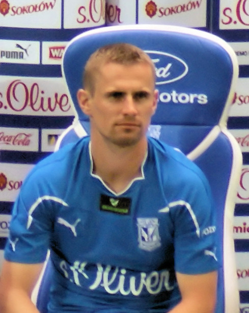 Seweryn Gancarczyk, piłkarz drużyny Lech Poznań.